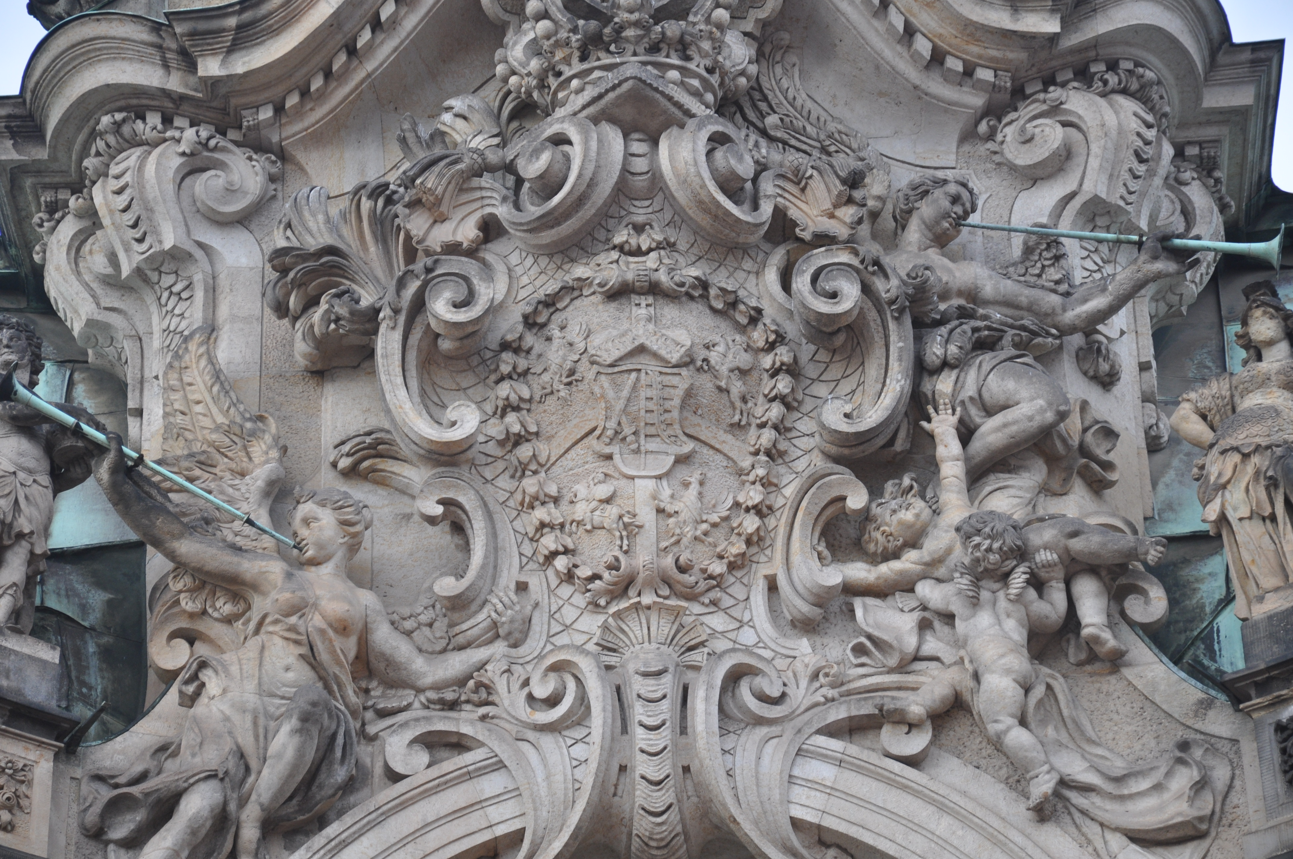 Dresden, Zwinger, Wappen; Blendgiebel des Wallpavillons